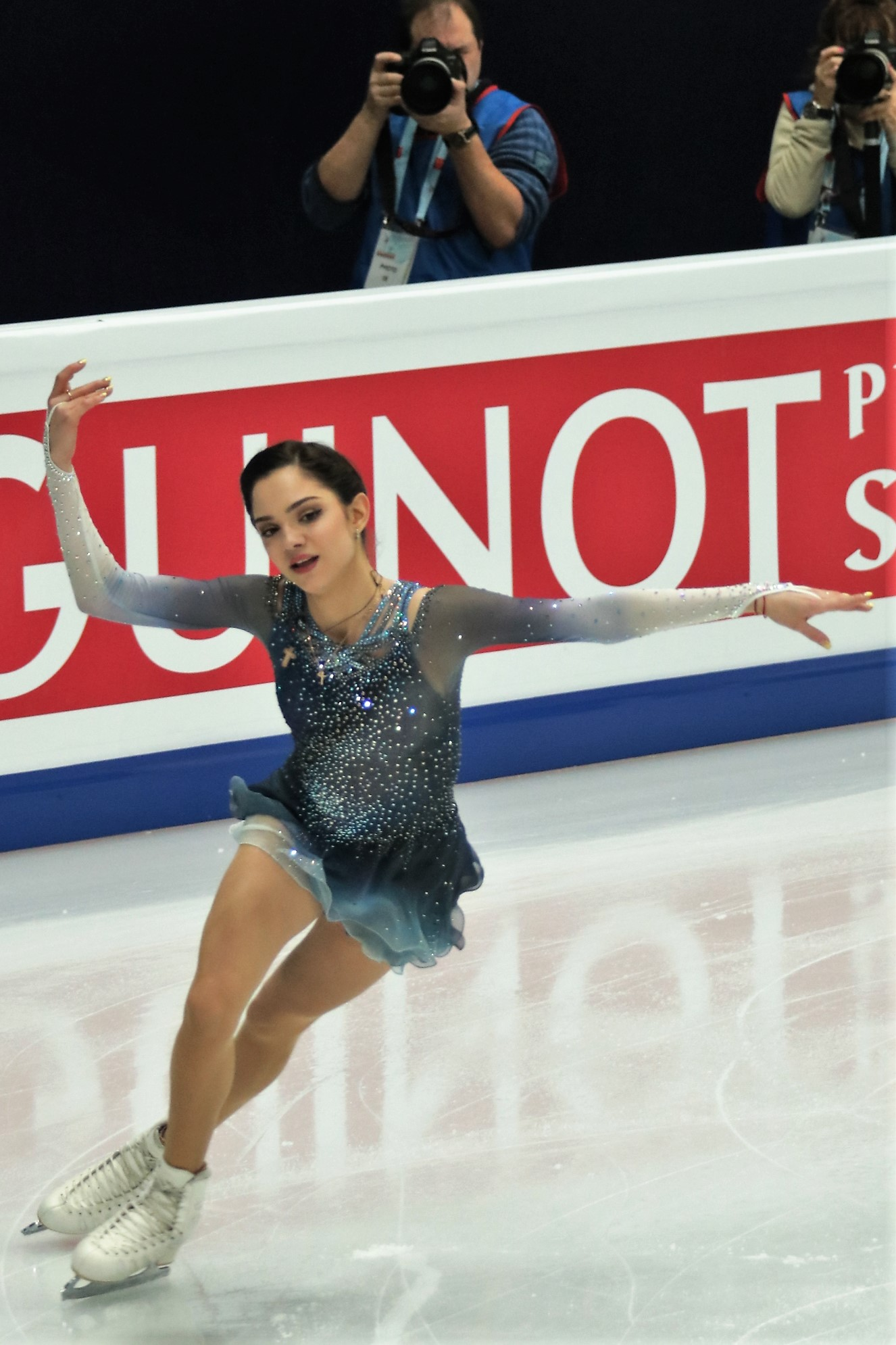 Евгения Медведева (Россия) на Чемпионате Европы по фигурному катанию 2018.